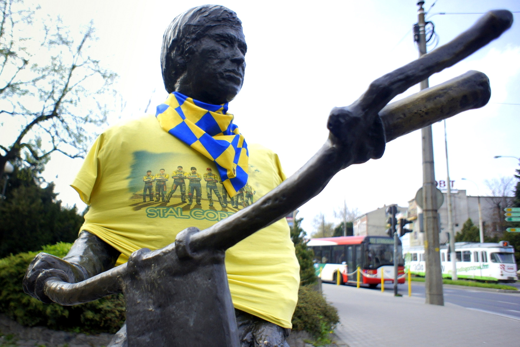 Gorzów Wlkp. Pomnik Edwarda Jancarza ubrany w koszulkę klubową